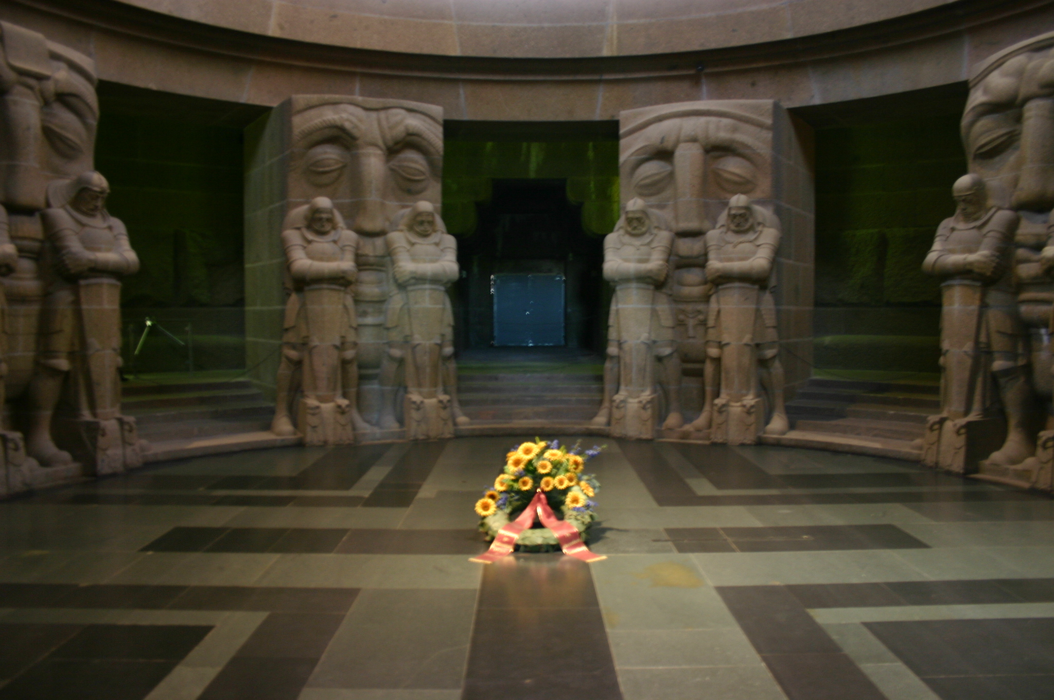 Krypta des Völkerschlachtdenkmals